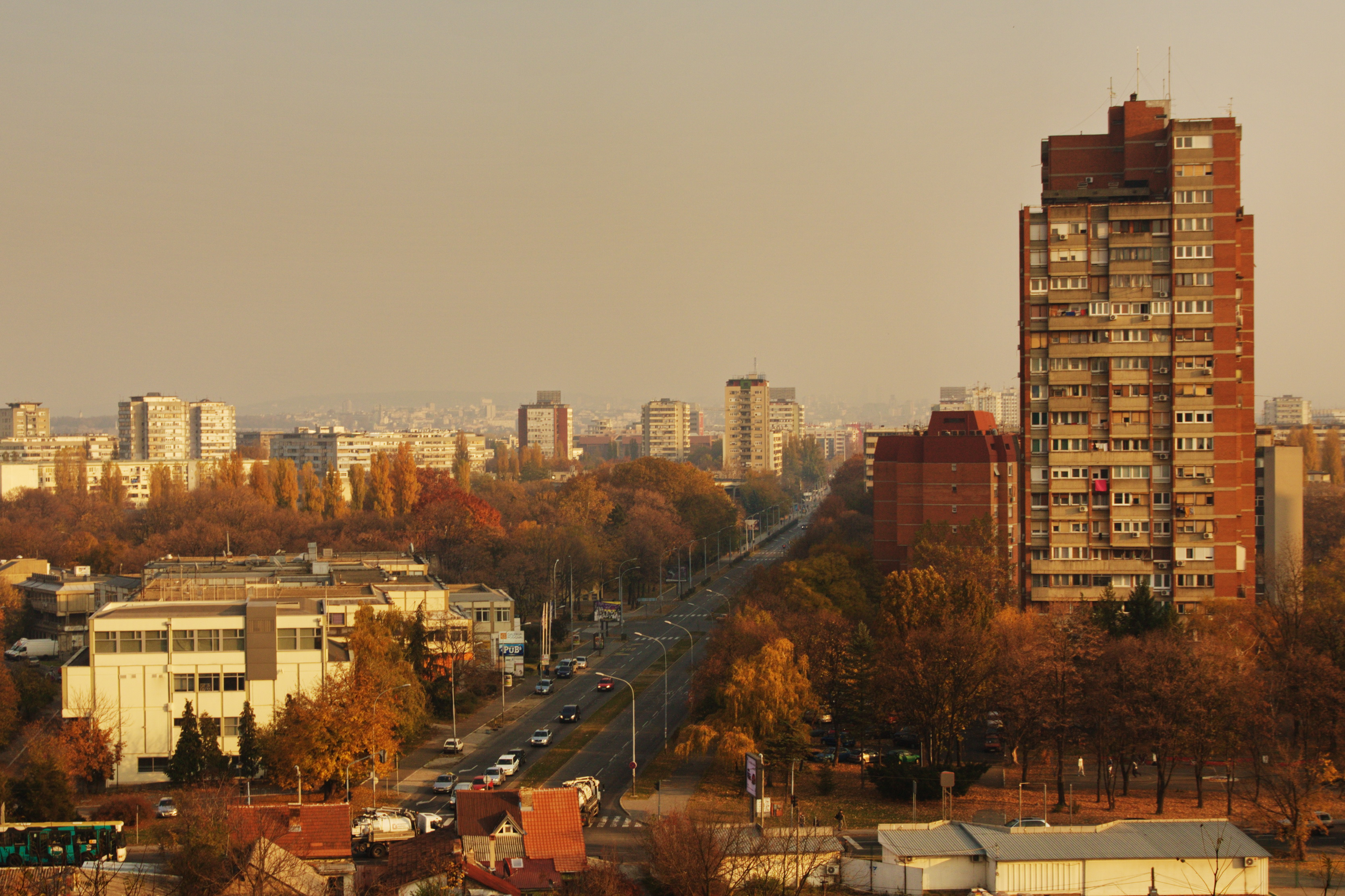 део улице Париске комуне, раскрсница са Тошиним бунаром ка робној кући и Фонтани, сликано са Беѕанијске косе, са леве стране у парку се налаѕи Девета београдска гимнаѕија